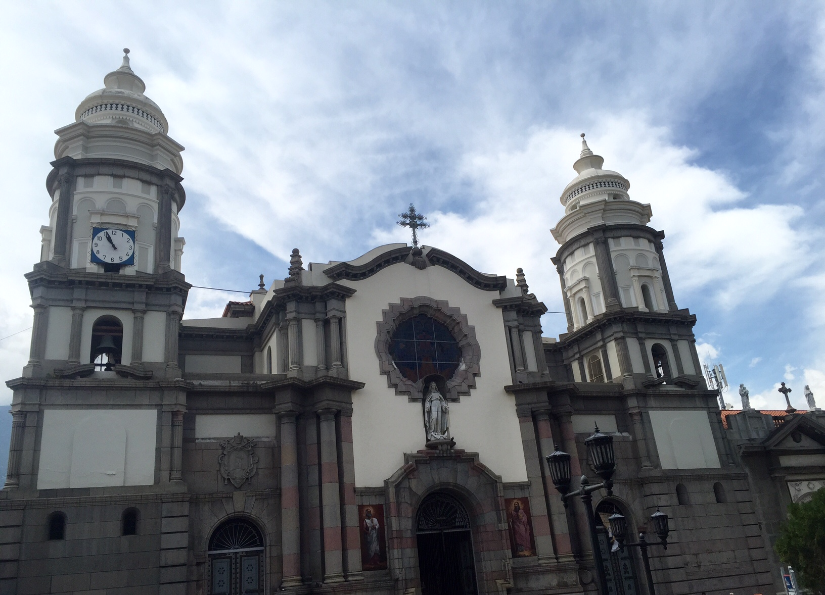 Catedral Metropolitana de Mérida.